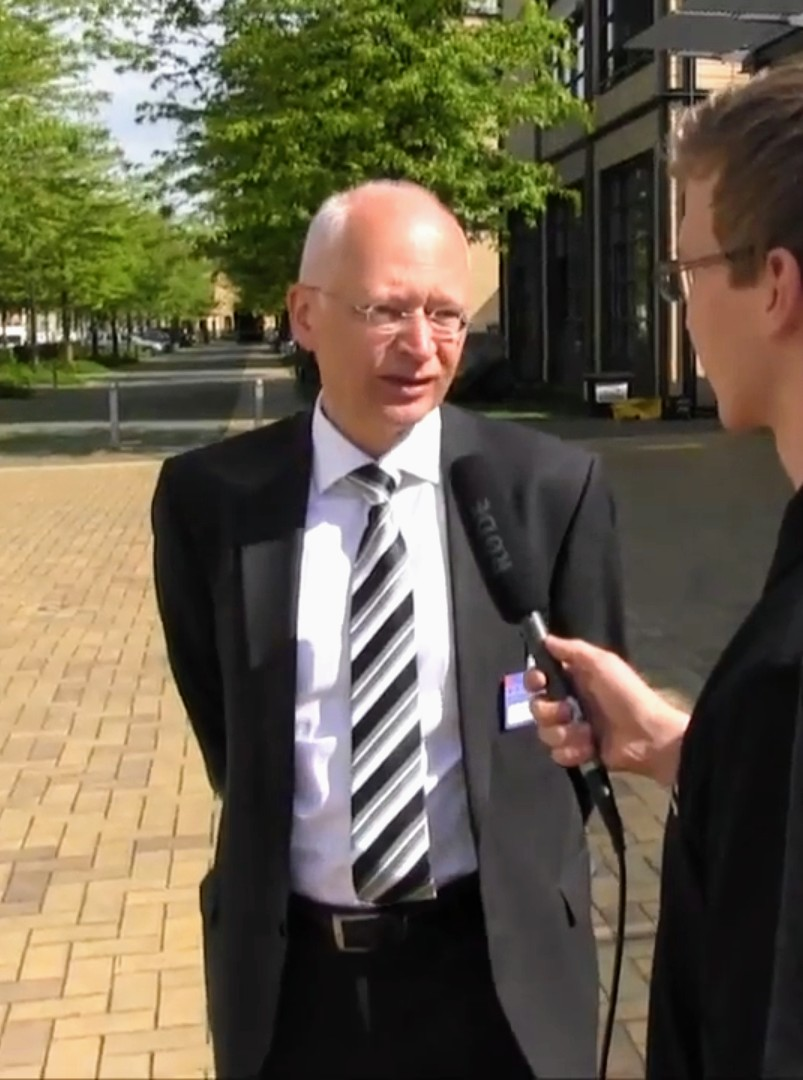 Dr. Jürgen Brautmeier ist Vorsitzender der DLM und verriet uns das Konzept der Landesmedienanstalten zum Thema Nachwuchsförderung. weitere Infos zum MTM auf